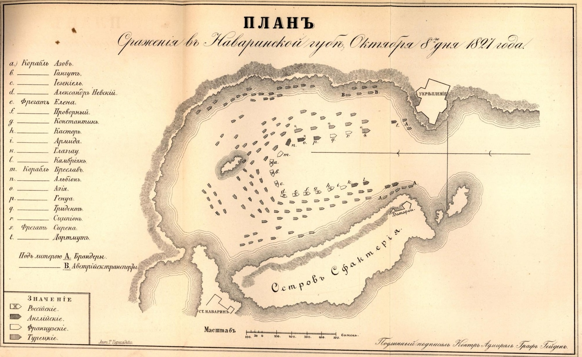 Наваринское сражение